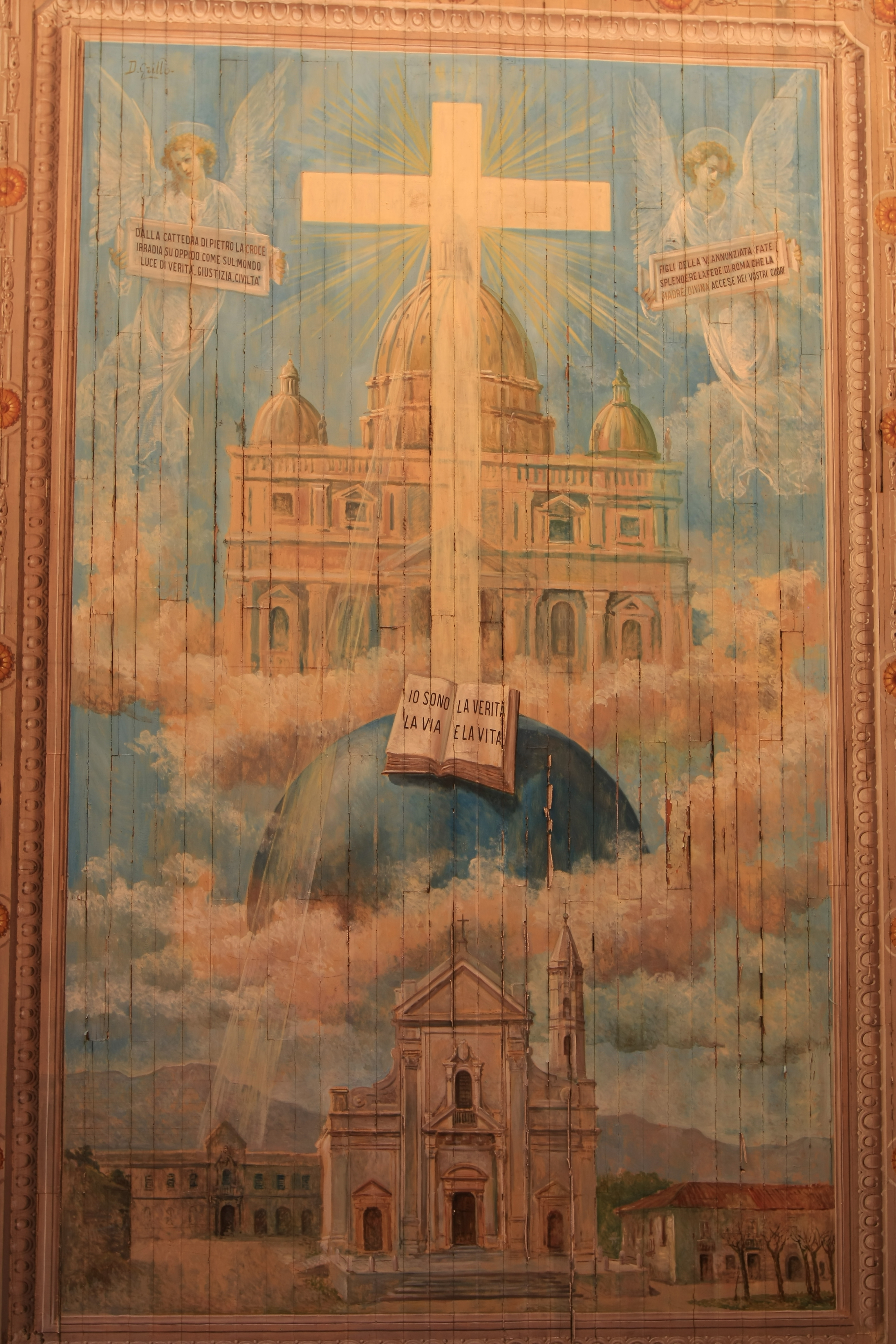 Salone dell'Episcopio, dipinto di Diego Grillo. Raggio di luce che dalla Chiesa Universale rappresentata dalla Basilica di San Pietro, raggiunge l'Episcopio della Chiesa Particolare che è in Oppido Mamertina.